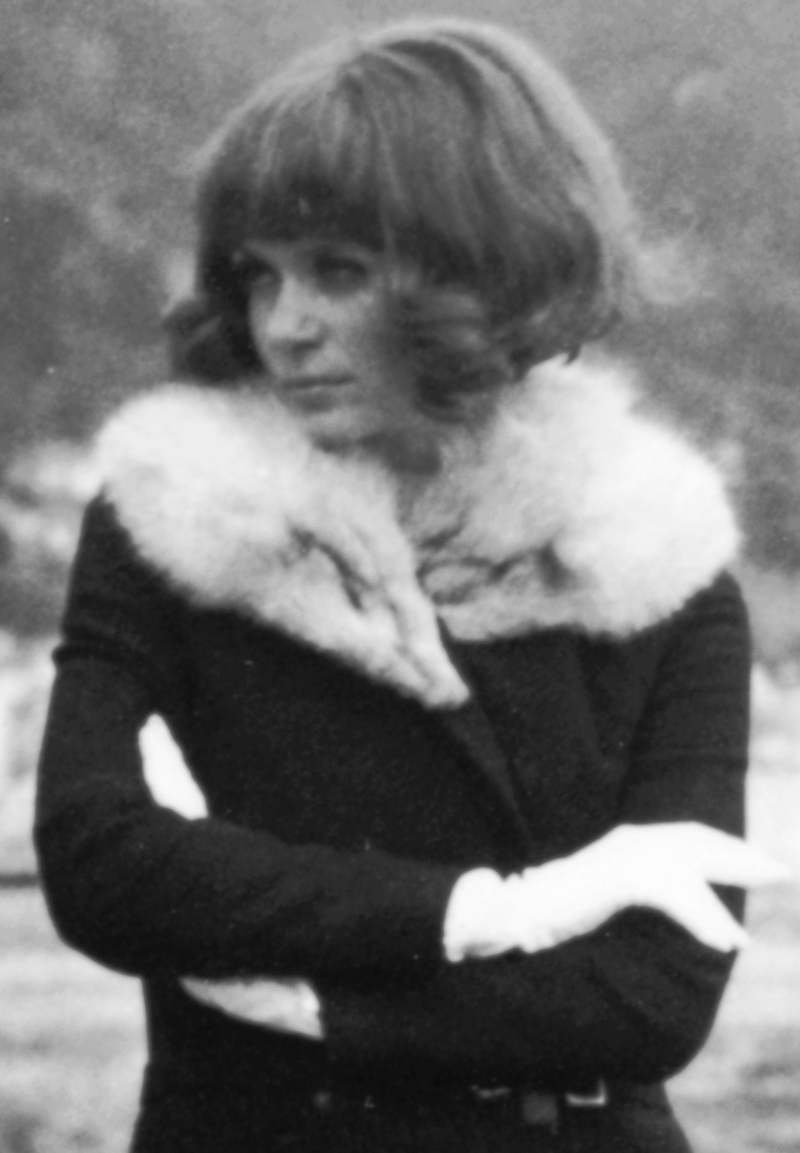 Zám Edit magyar szupermodell, manöken.